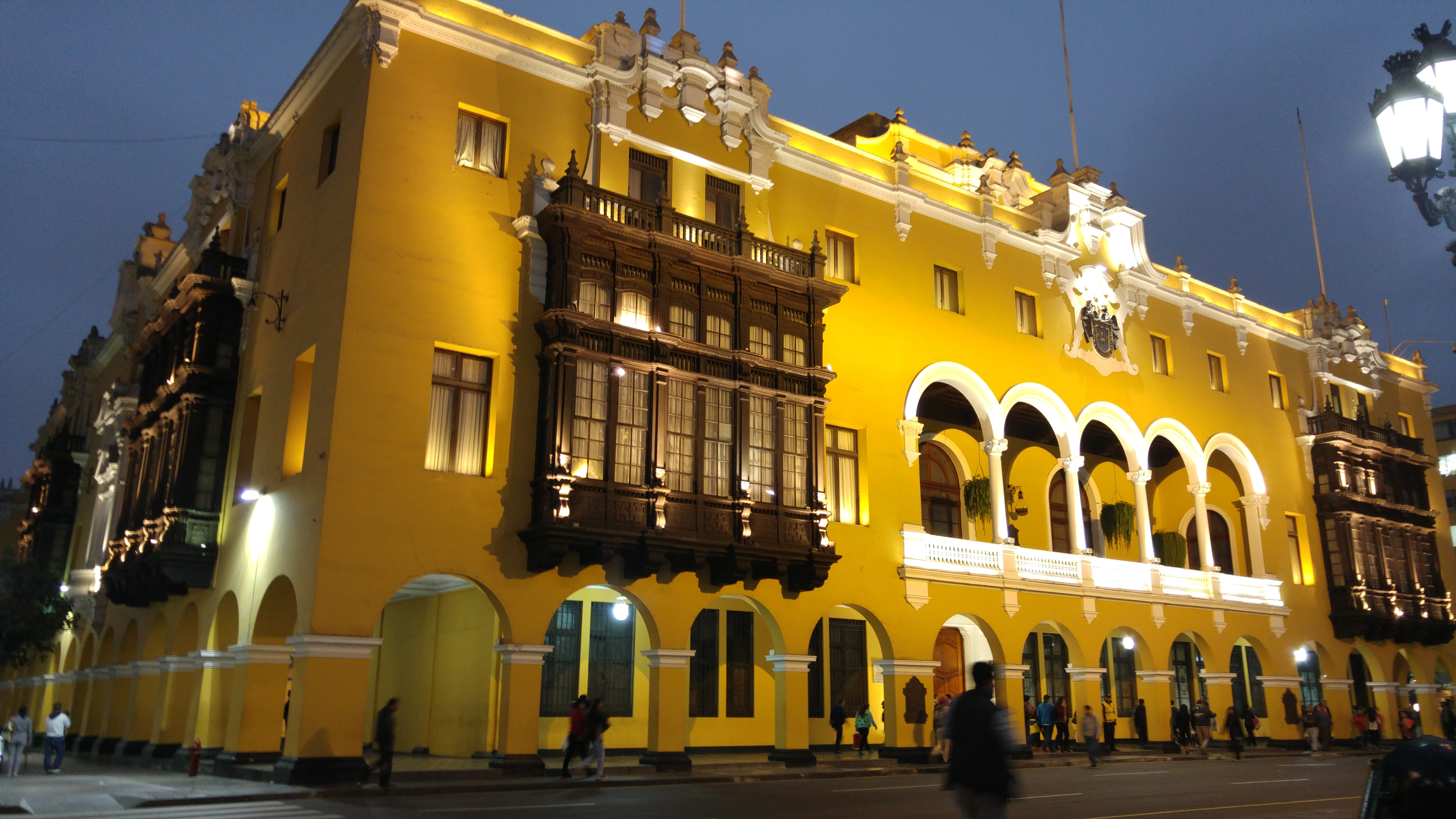 Edificio colonial de la Municipalidad Metropolitana de Lima en la Plaza de Armas.